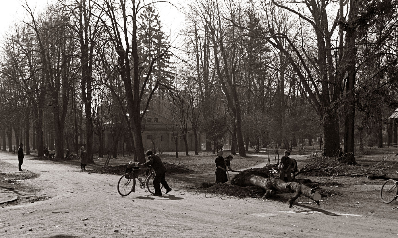 Podiranje dreves v ulici Heroja Staneta.